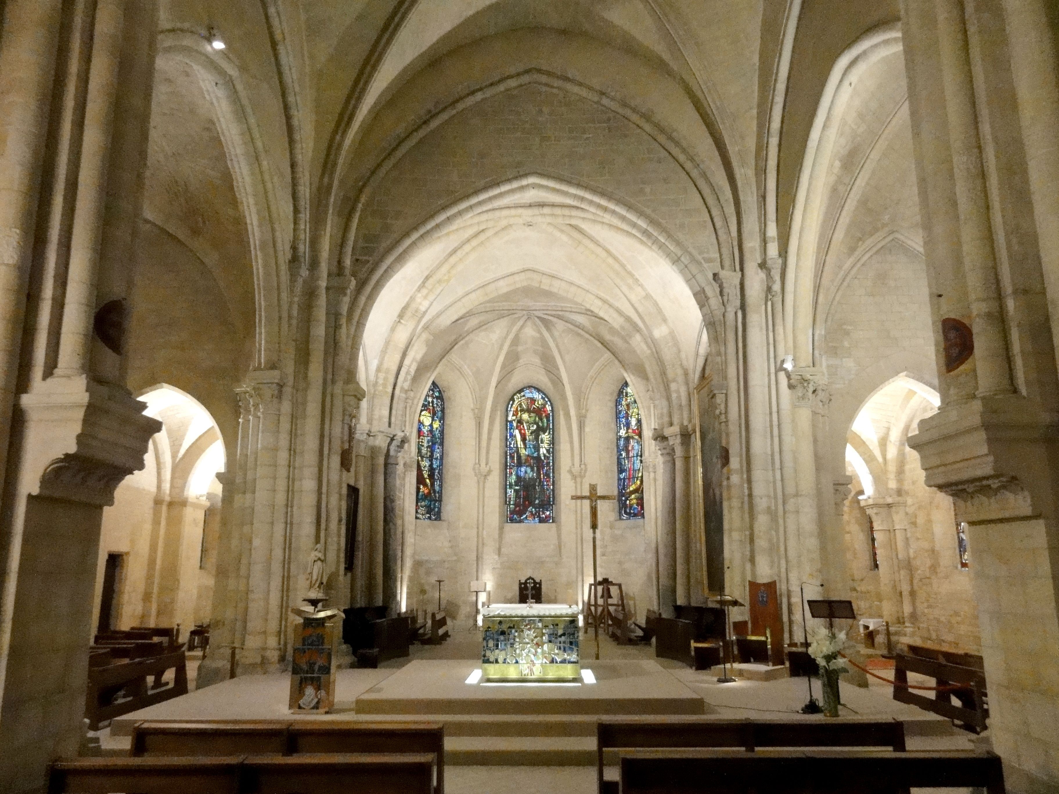 Nef, vue vers l'est.